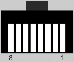 RJ45-Buchse Ansicht von Vorne. Riegel oben liegend.